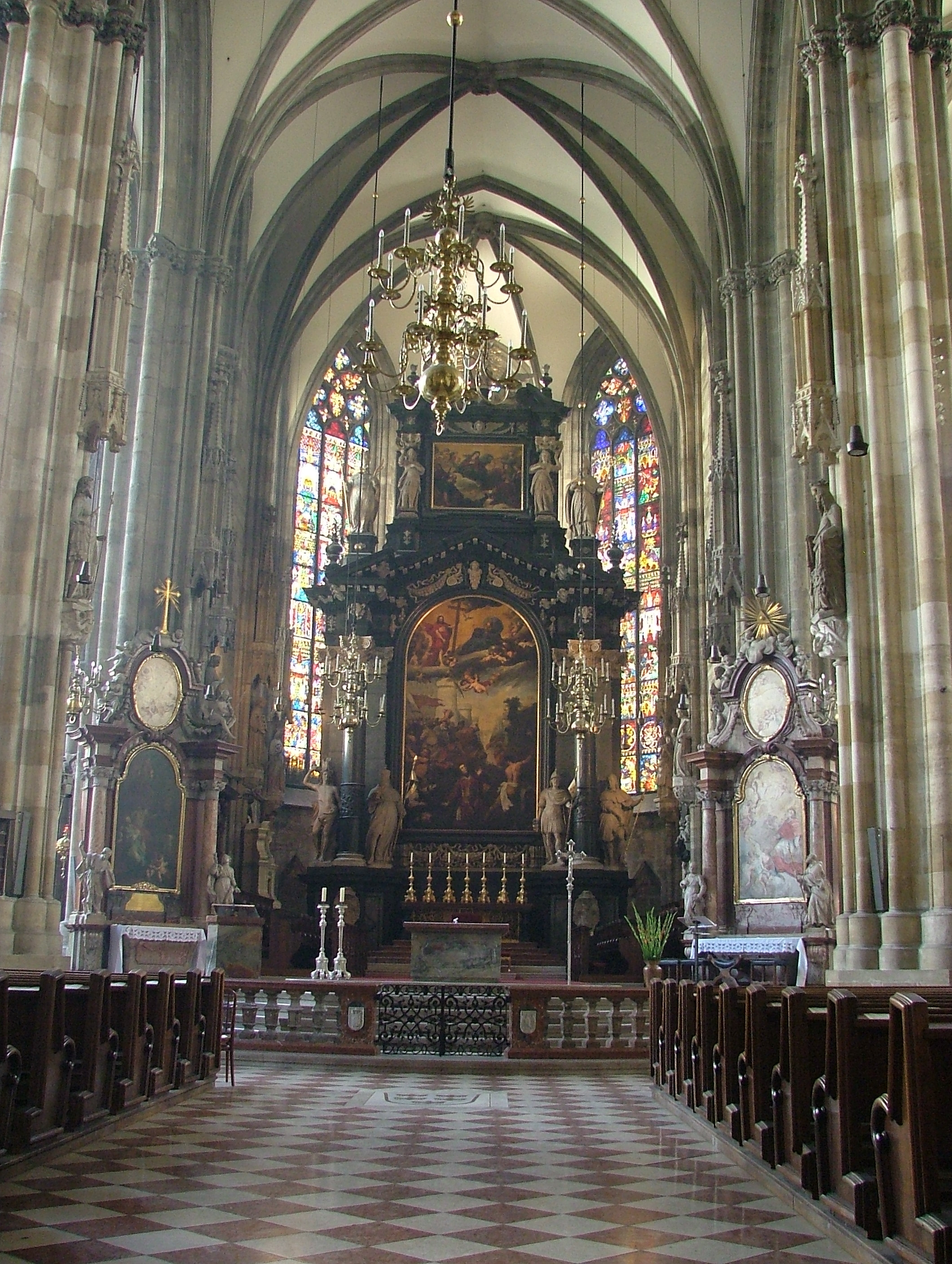 Hauptaltar im Stephansdom (aufgen. Wien, Sommer 2004) selbst fotografiert